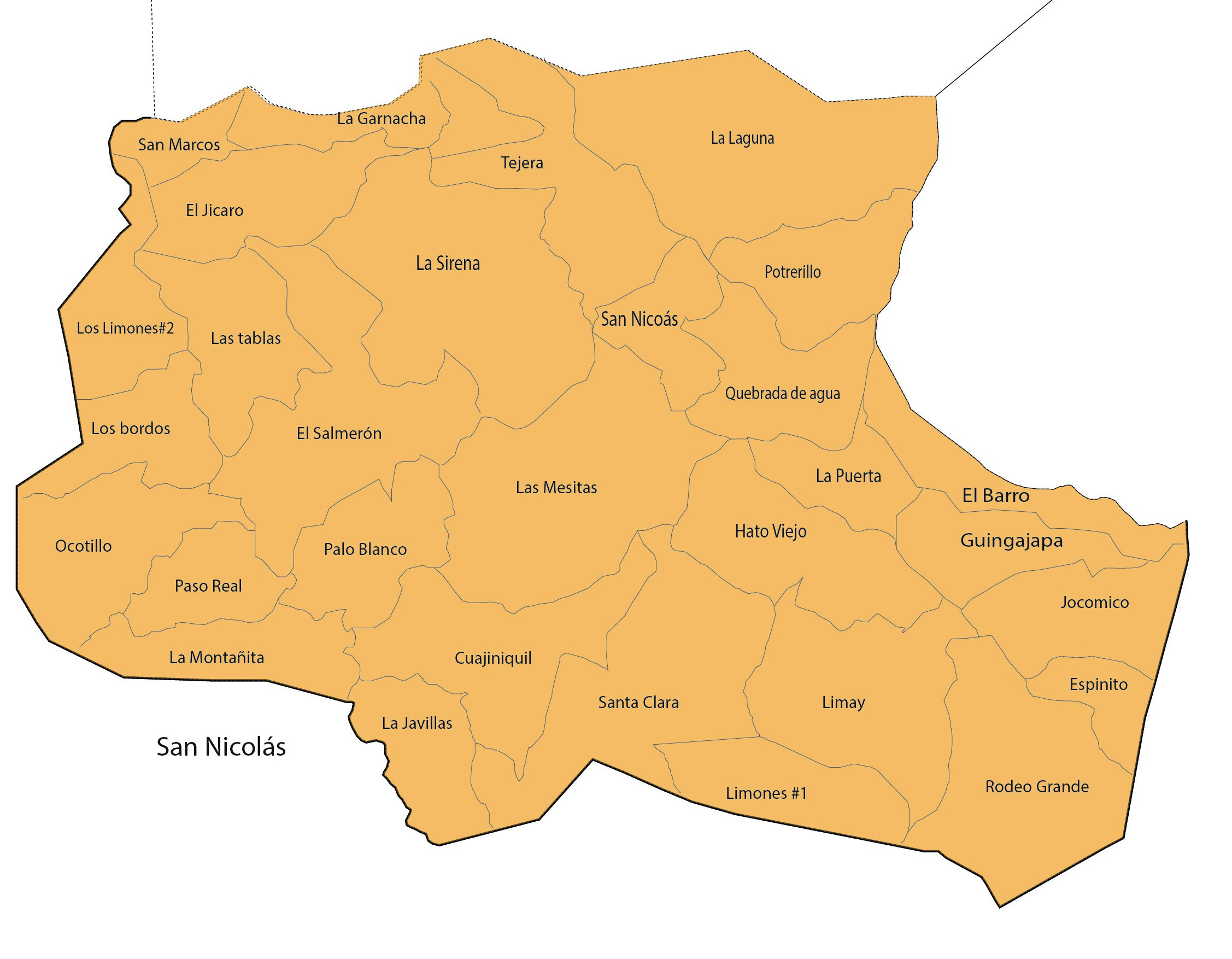 Mapa San Nicolás